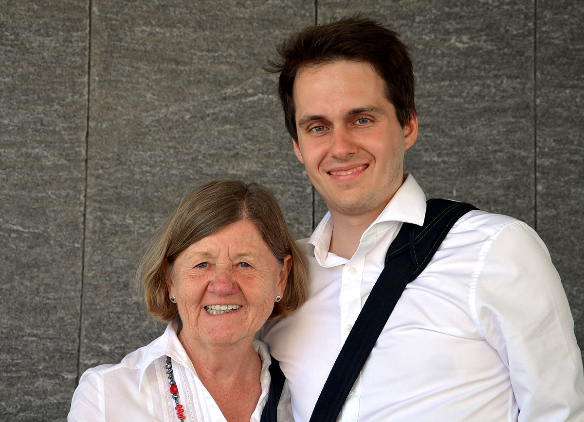 Generationenübergreifend nach dem Besuch der Ausstellung ZwischenZeit im Historischen Museum Hannover: Die ehemalige Bürgermeisterin im Bezirksrat Ahlem-Badenstedt von Hannover, Ingrid Lange, und der Bündnis90/Die Grünen-Bundestagsabgeordnete Sven-Christian Kindler vom Projekt Jung und älter zusammen in der Politik ...